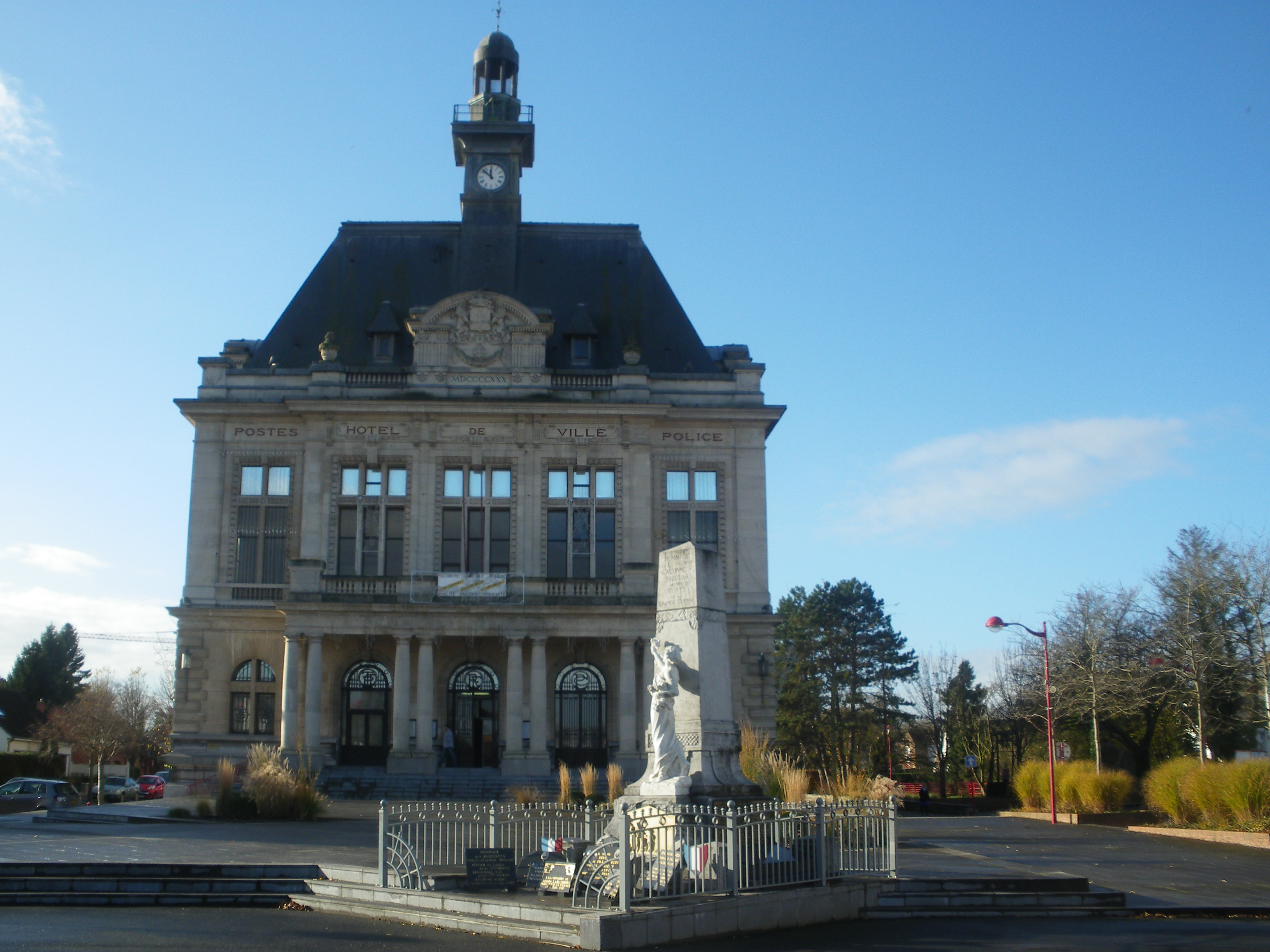 L'hôtel de ville et le monument aux morts de Calonne-Ricouart.